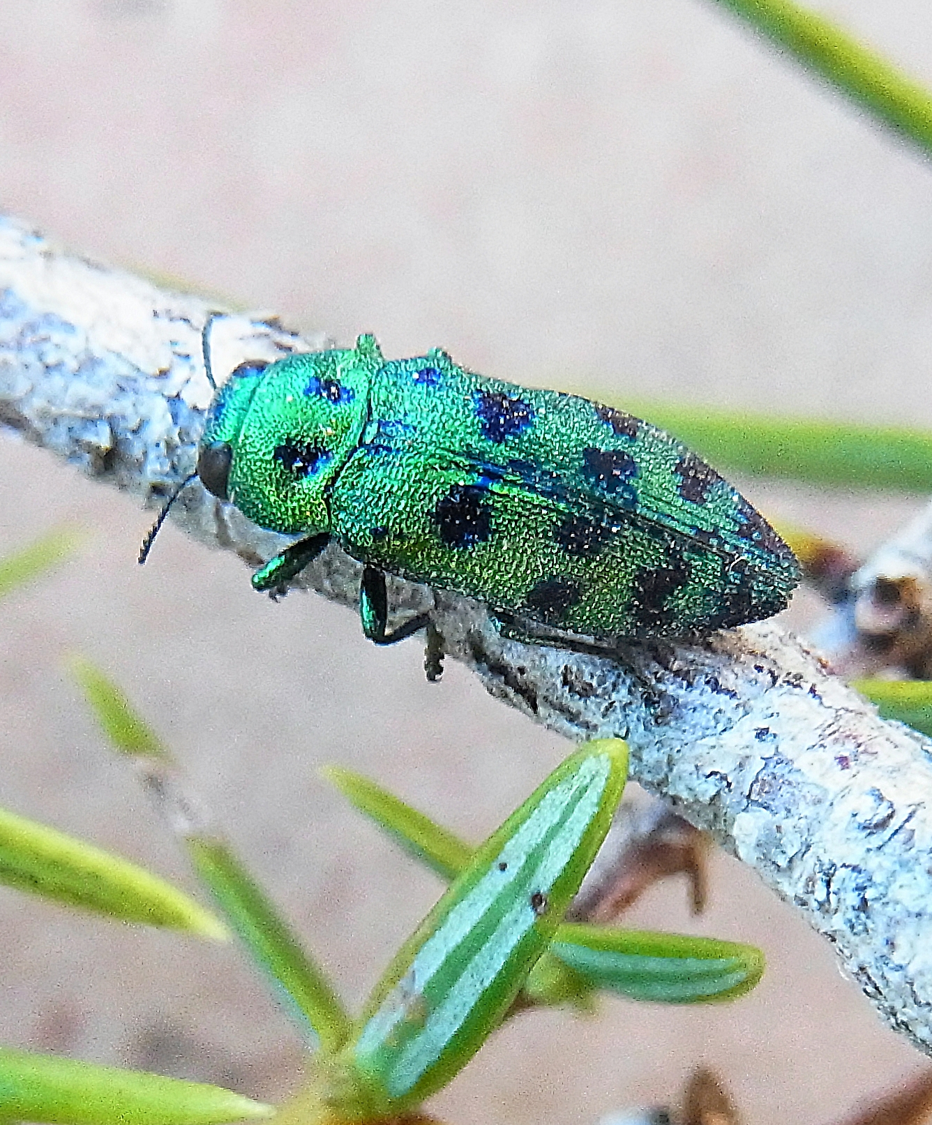 Palmar festiva from Spain, west of Barcelona at 2013-06-14